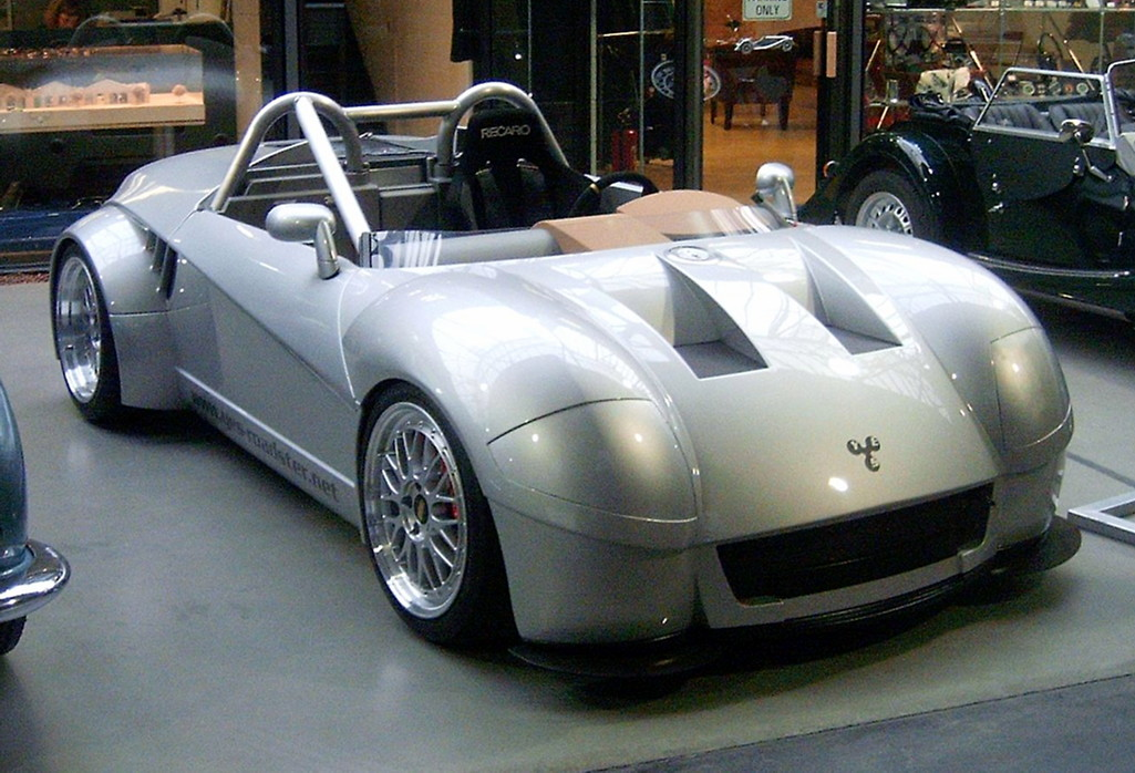 YES Roadster im Meilenwerk